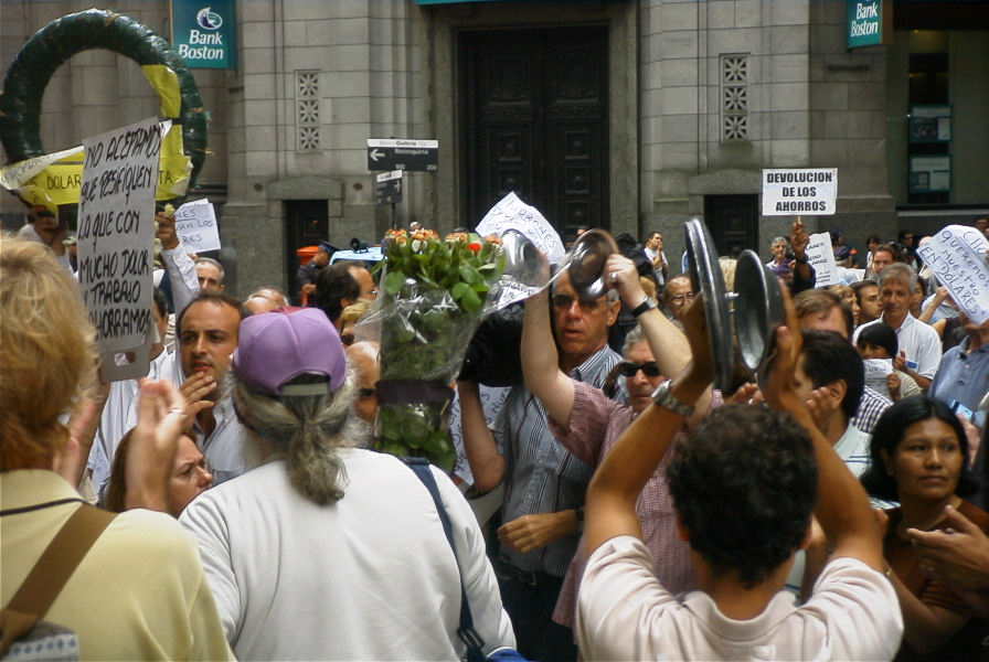 Manifestación de ahorristas argentinos contra el Corralito financiero, en la vereda de la Casa Central y Sucursal Plaza de Mayo del Banco de la Nación Argentina, Reconquista y Bartolomé Mitre, Buenos Aires, Argentina.